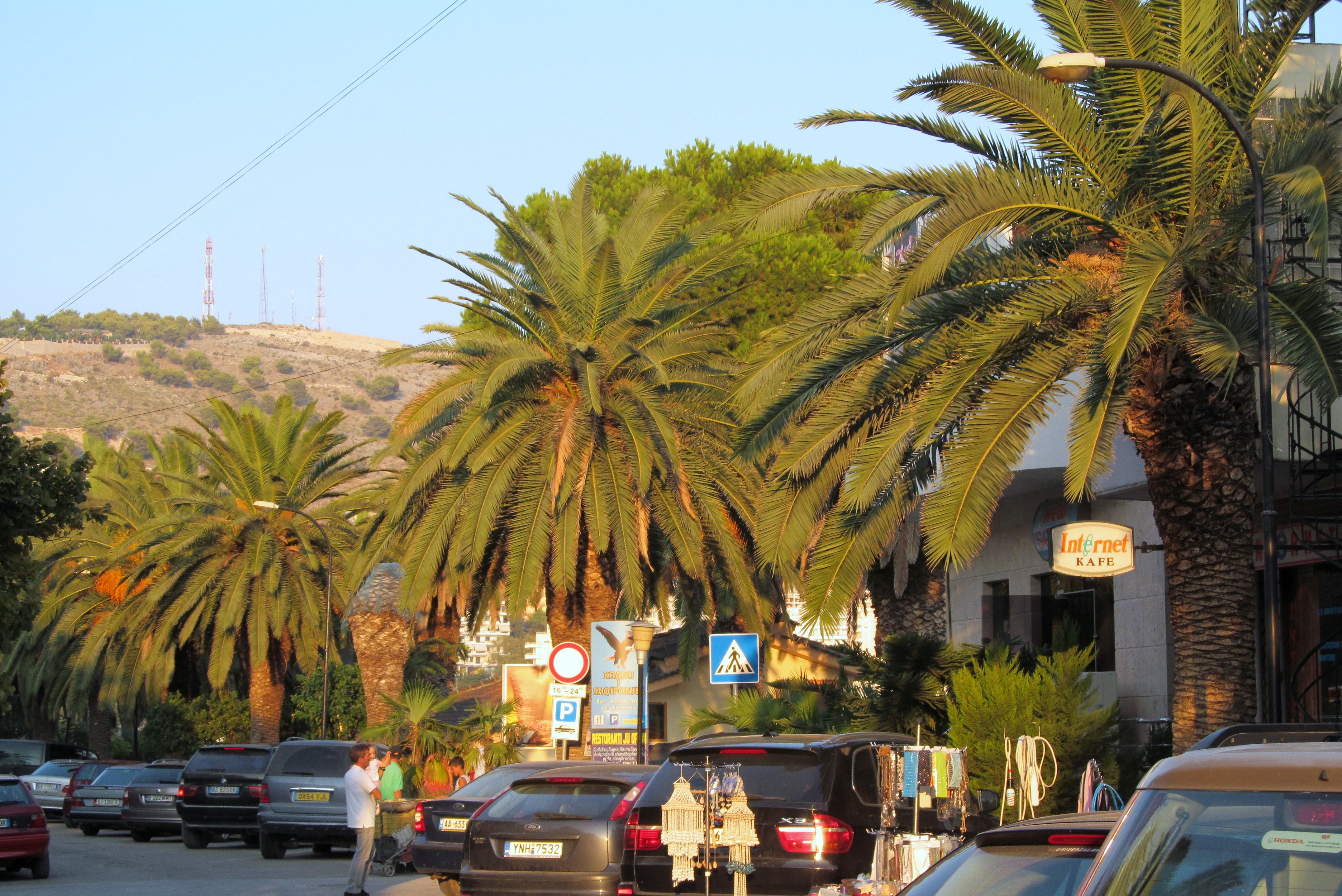 Saranda Albania